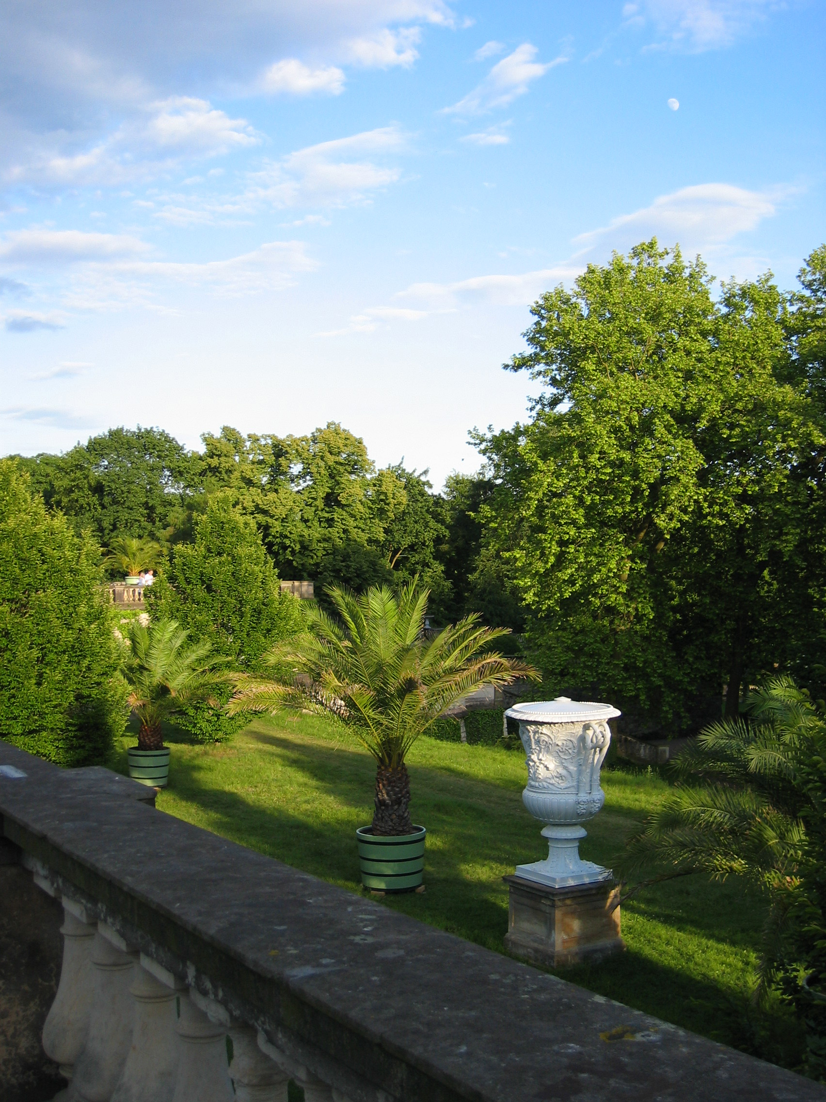 Eine von zwei monumentalen Zinkgussvasen auf der mittleren Terrasse der Neuen Orangerie in Potsdam-Sanssouci, Entwurf: Ludwig Ferdinand Hesse 1843